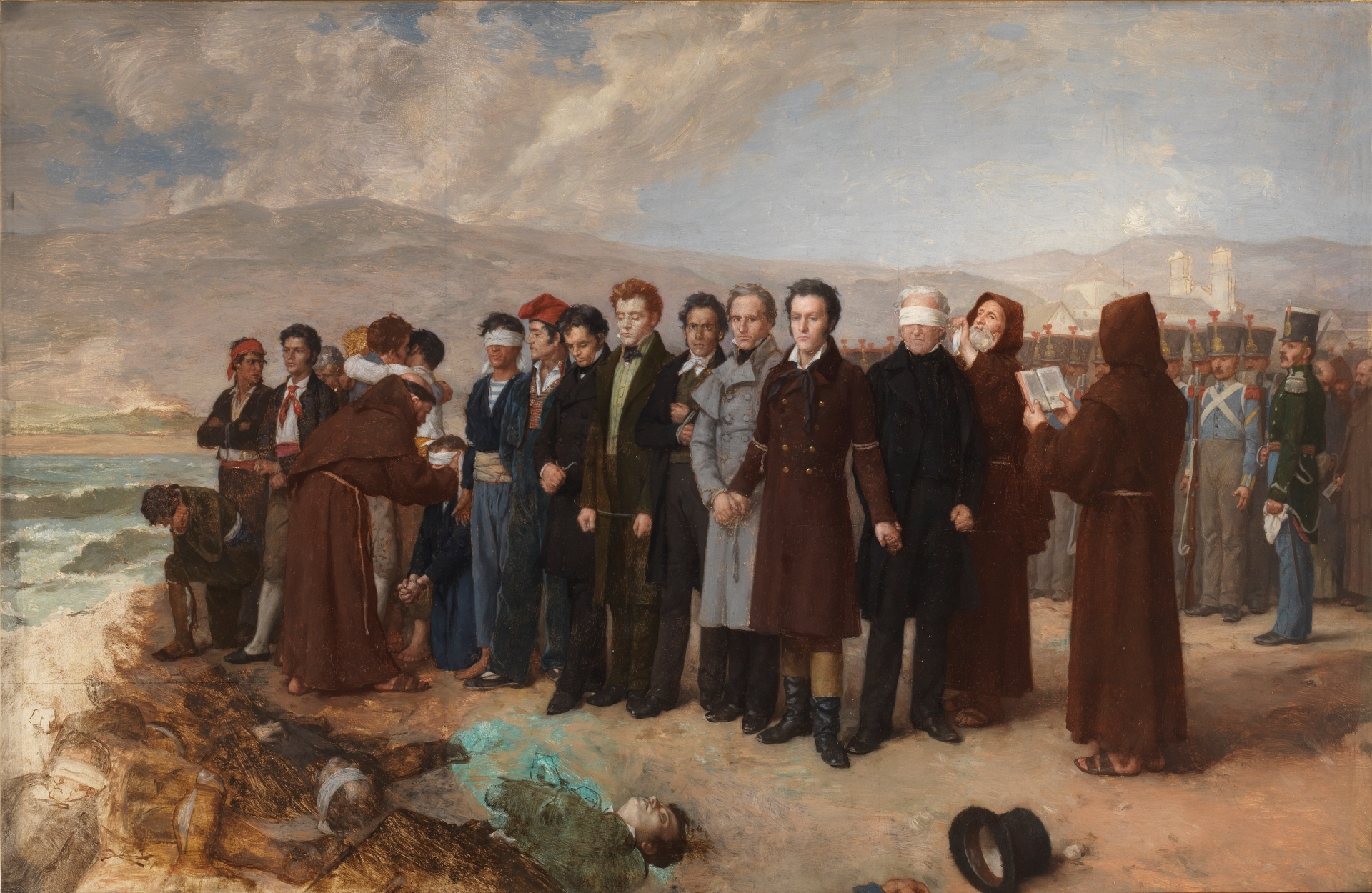 El boceto representa el fusilamiento del general Torrijos y sus compañeros en las playas de Málaga. El general José María de Torrijos y Uriarte (1791-1831) que llegó a ser capitán general de Valencia, mariscal de campo y ministro de la Guerra durante el Trienio Liberal (1820-1823). Tras la vuelta al absolutismo, se sublevó y fue víctima de una emboscada preparada por el gobernador de Málaga, Vicente González Moreno, quien le había asegurado el triunfo de la rebelión. El día 11 de diciembre de 1831, a las once y media de la mañana, y sin juicio previo, el general Torrijos y 48 de sus compañeros fueron fusilados en las playas de Málaga. Está considerada una obra maestra de la pintura histórica del siglo XIX español y fue encargada en 1886 directamente por el Gobierno liberal de Práxedes Mateo Sagasta (1825-1903), durante la regencia de la reina María Cristina de Austria, como ejemplo de la defensa de las libertades para las futuras generaciones.